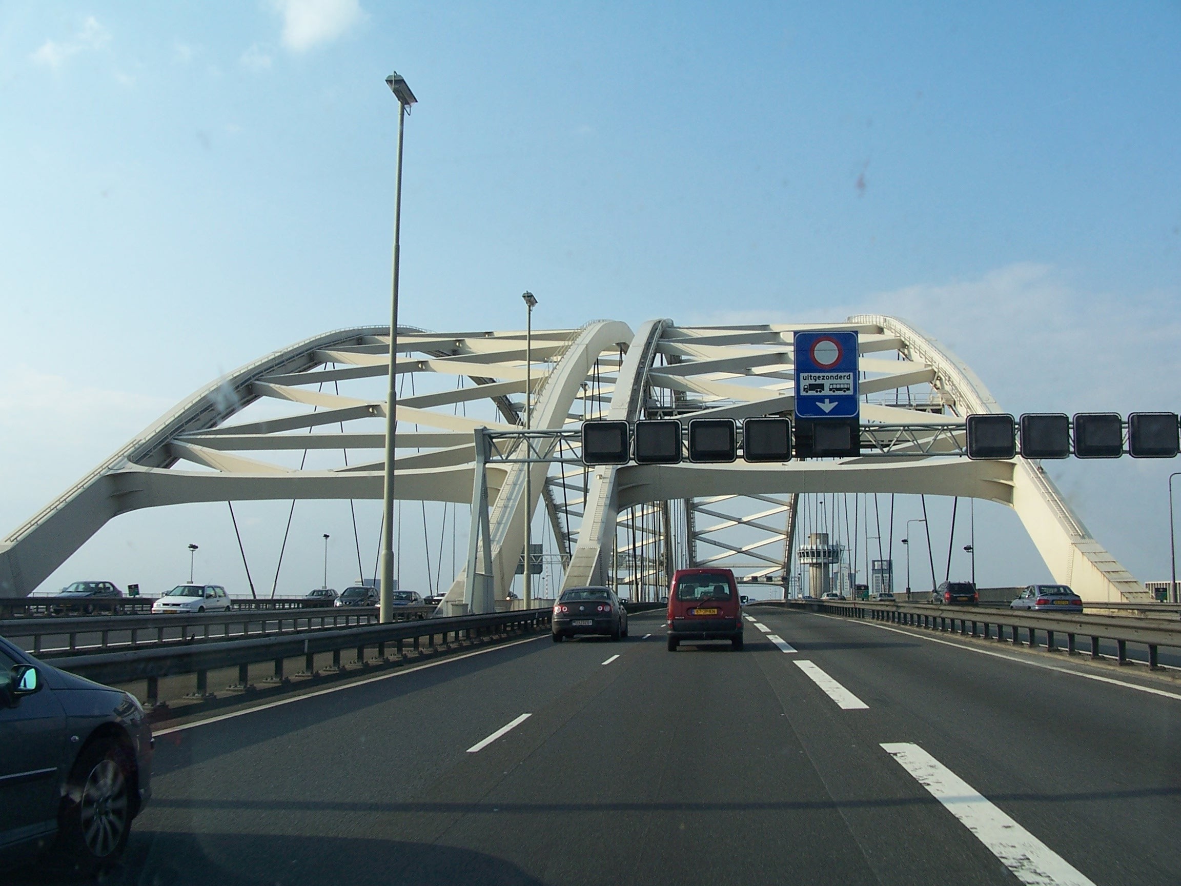 Van Brienenoordbrug, vrachtwagenstrook